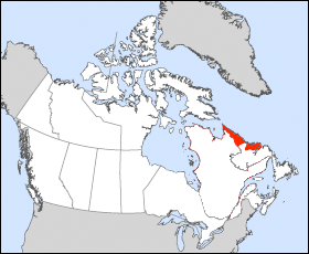 Carte du Nunatsiavut